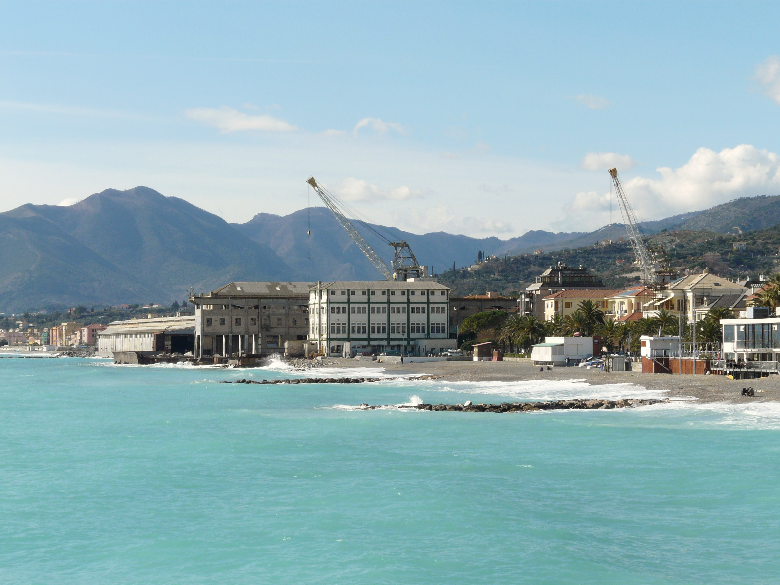 Pietra Ligure, Liguria, Italia